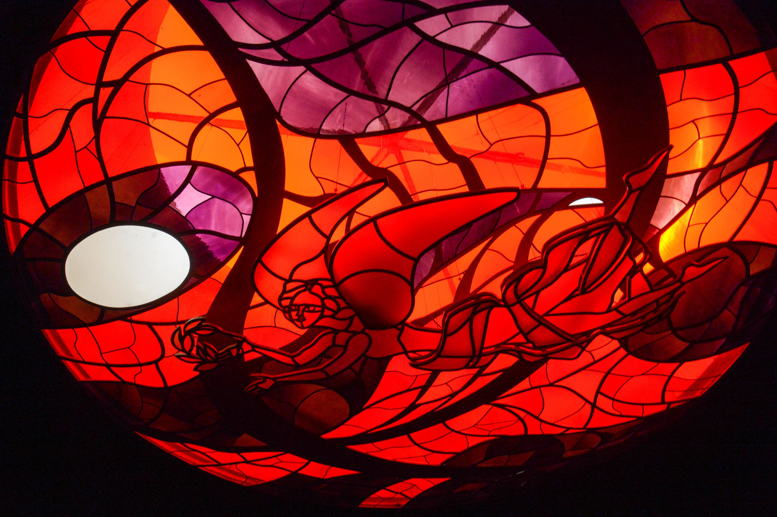 Obra de Marianne Peretti